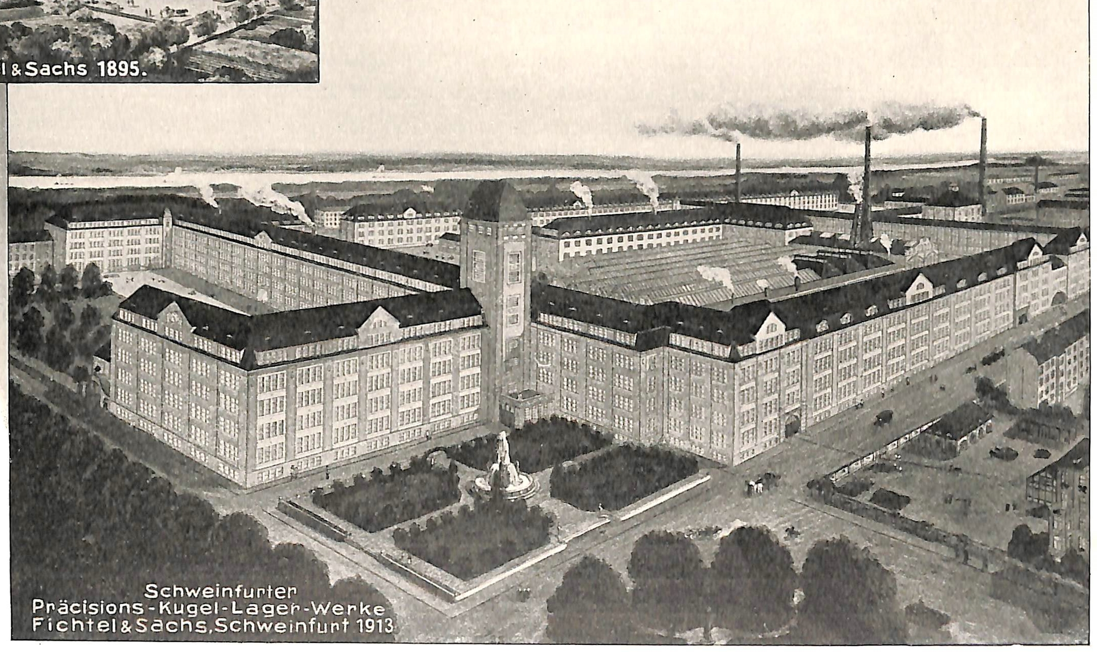 Schweinfurt - (fiktive) Ansicht des Firmengebäudkomplexes im Jahr 1913